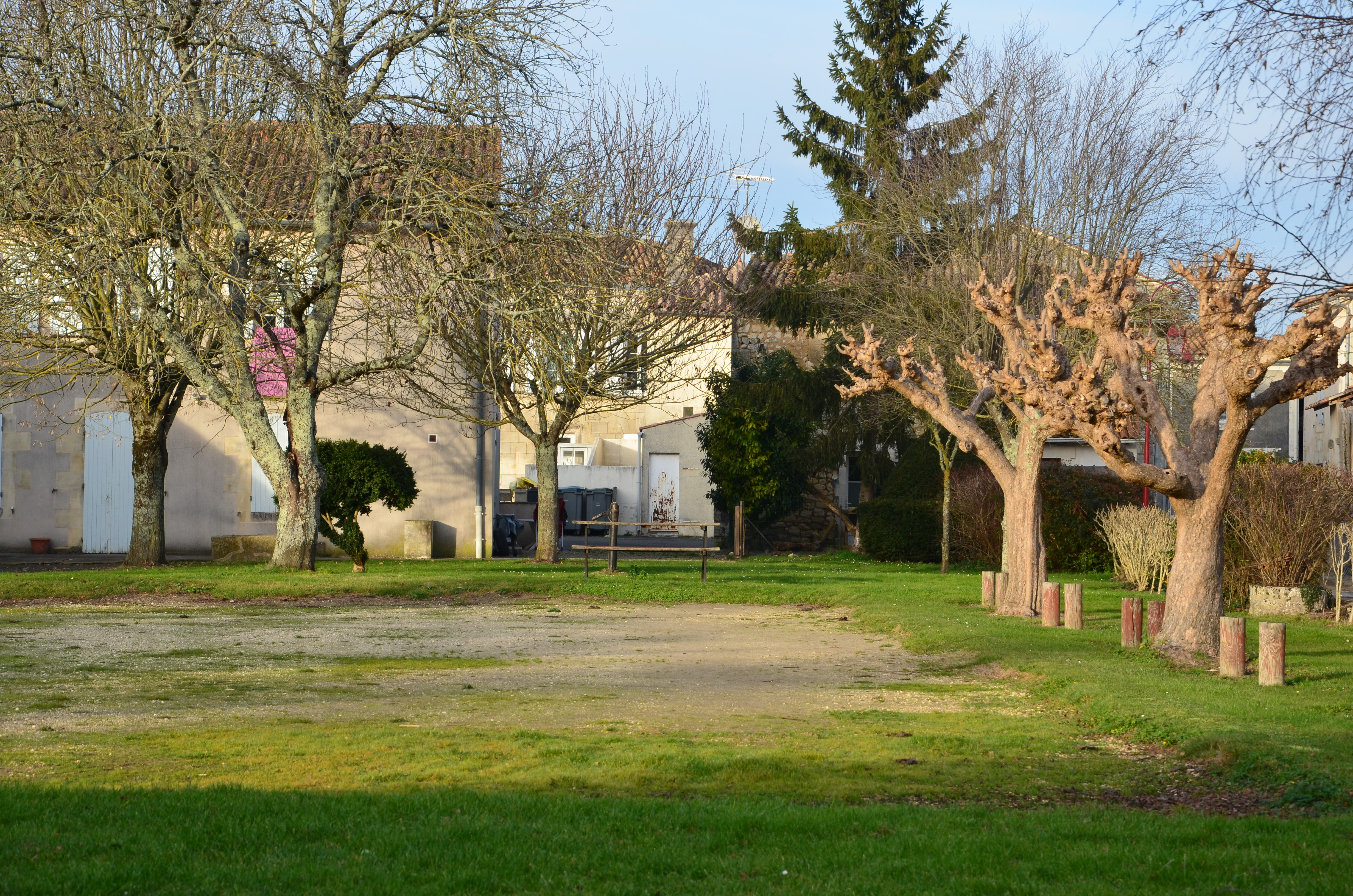 boulodrome